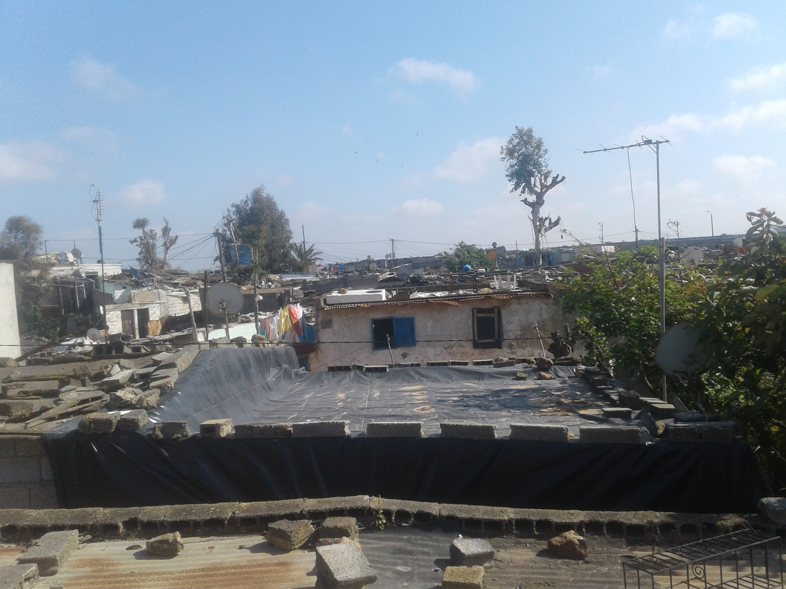 إحدى مدن الصفيح في الصخيرات